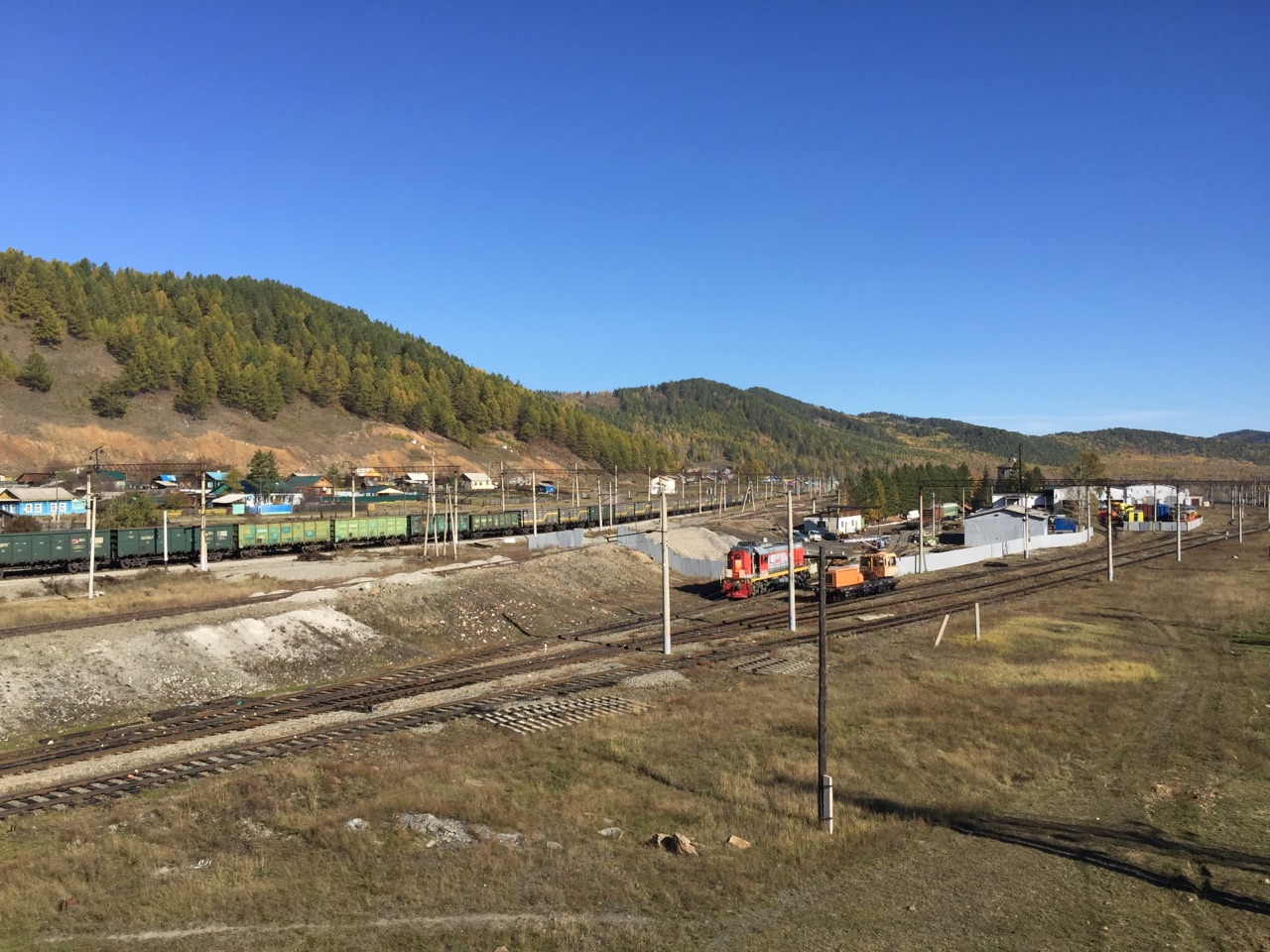 Станция Амзар